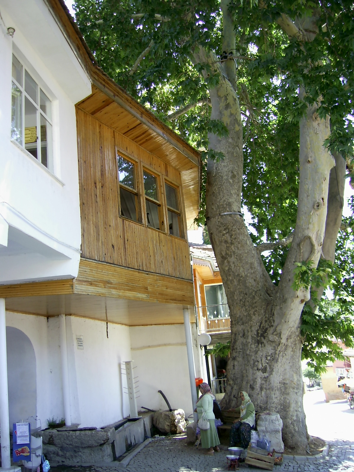 said i nursi hz. evi